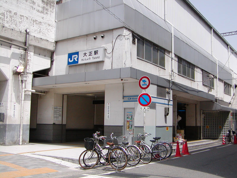 大阪環状線大正駅（大阪市大正区）。